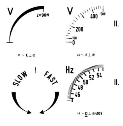 96SVP skála mesterrajza.